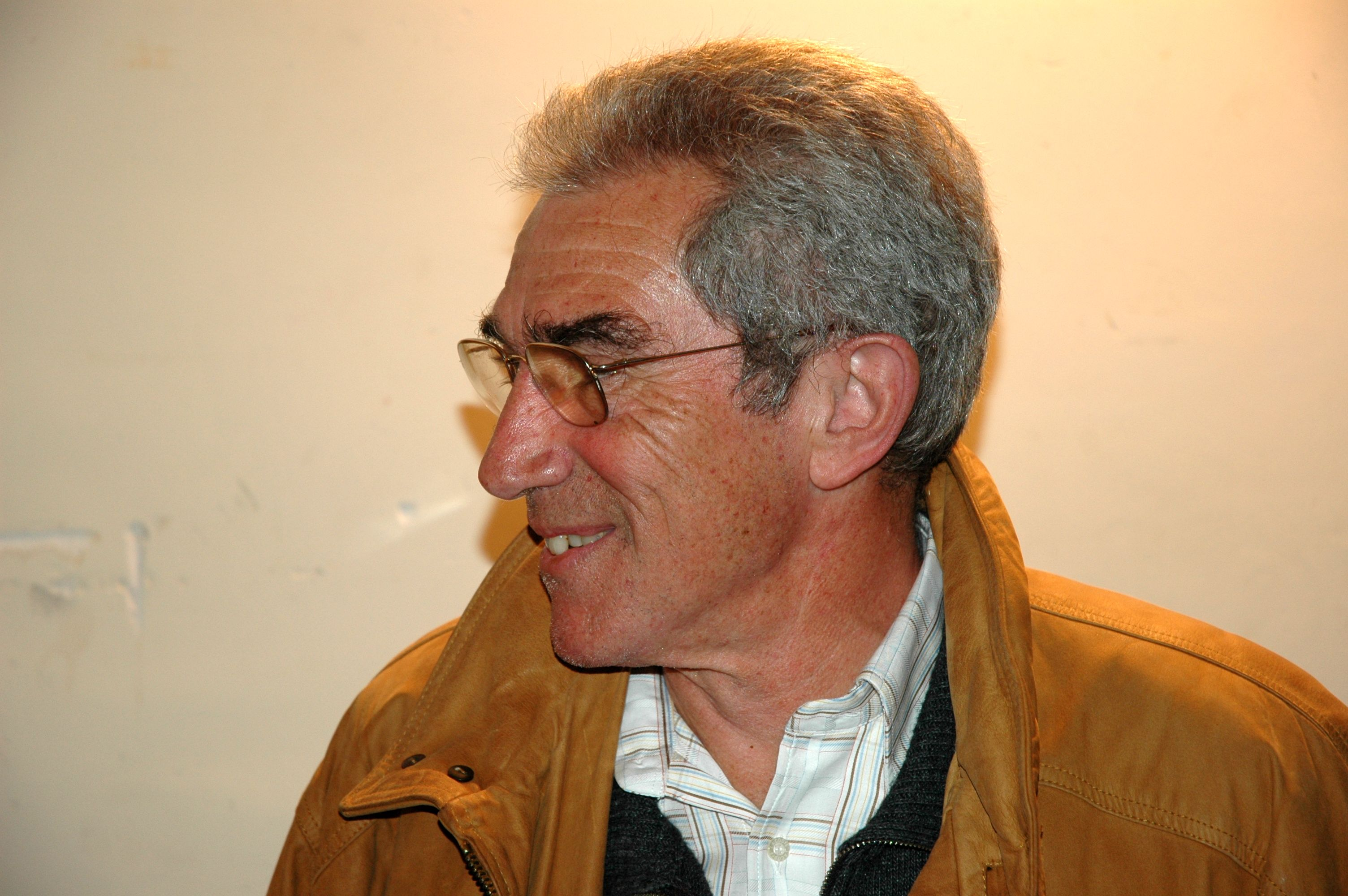 Xavier Elias